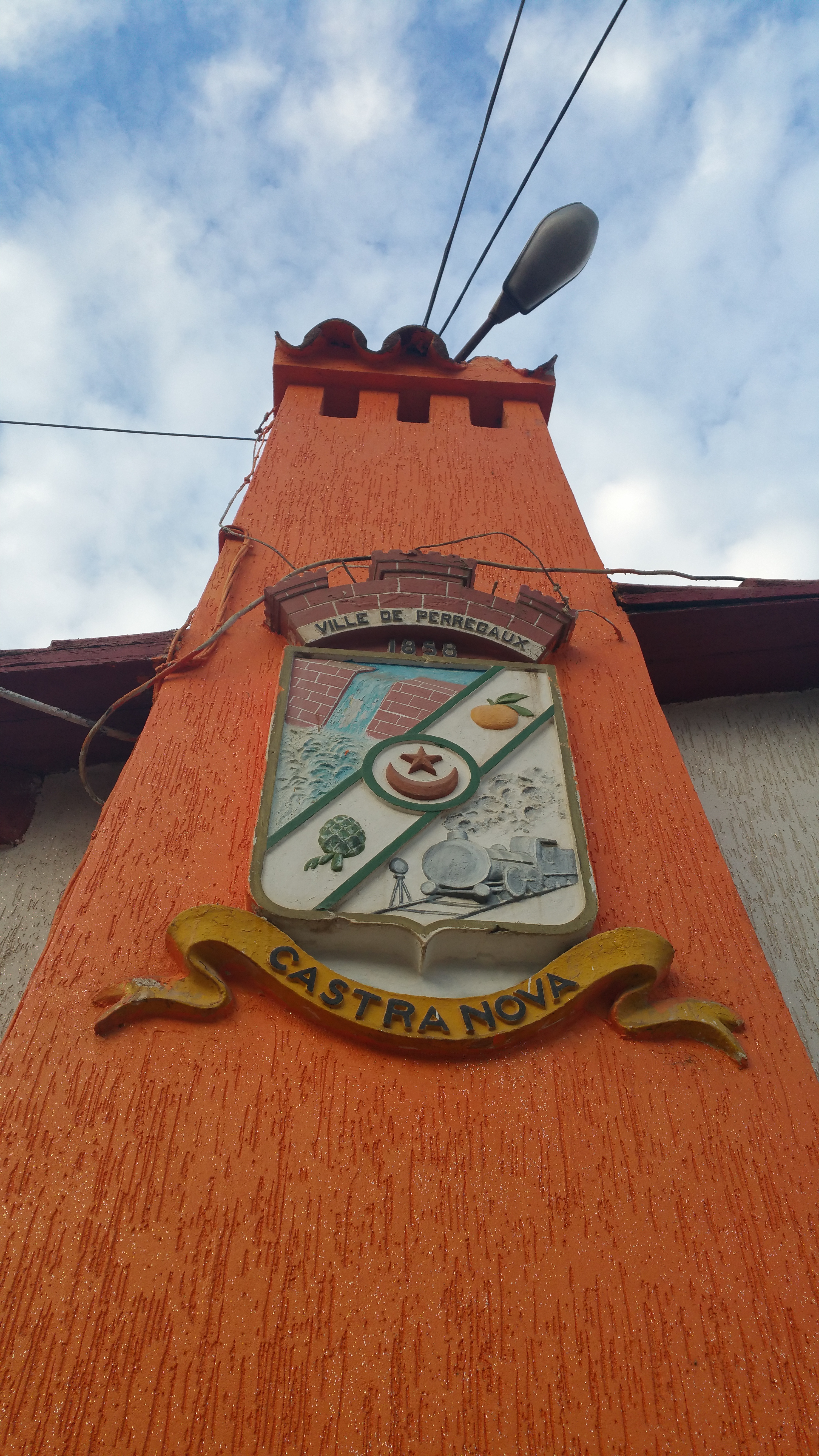 armoiries mohammadia mascara